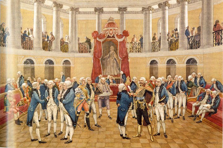 В.Я. Чемберс. Дворянское собрание в екатерининские времена - 1913